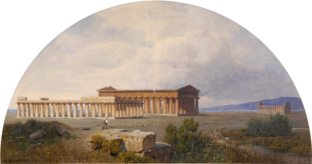 Tempelanlage von Paestum. Signiert. Datiert (18)81. Gouache. 50 x 95 cm